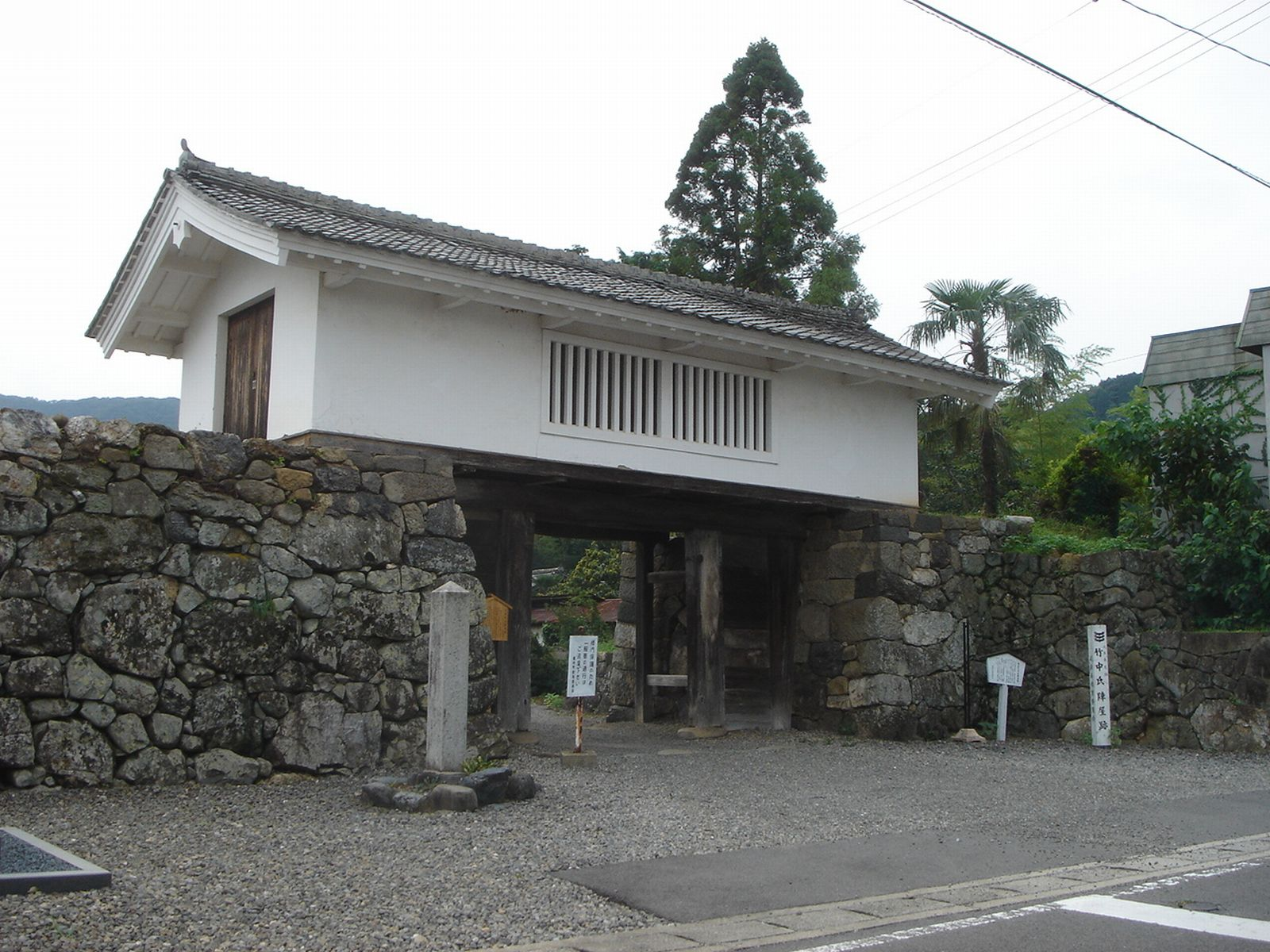 Takenaka's Jinya remain（竹中氏陣屋跡）,Tarui,Gifu,Japan(岐阜県垂井町)で撮影。